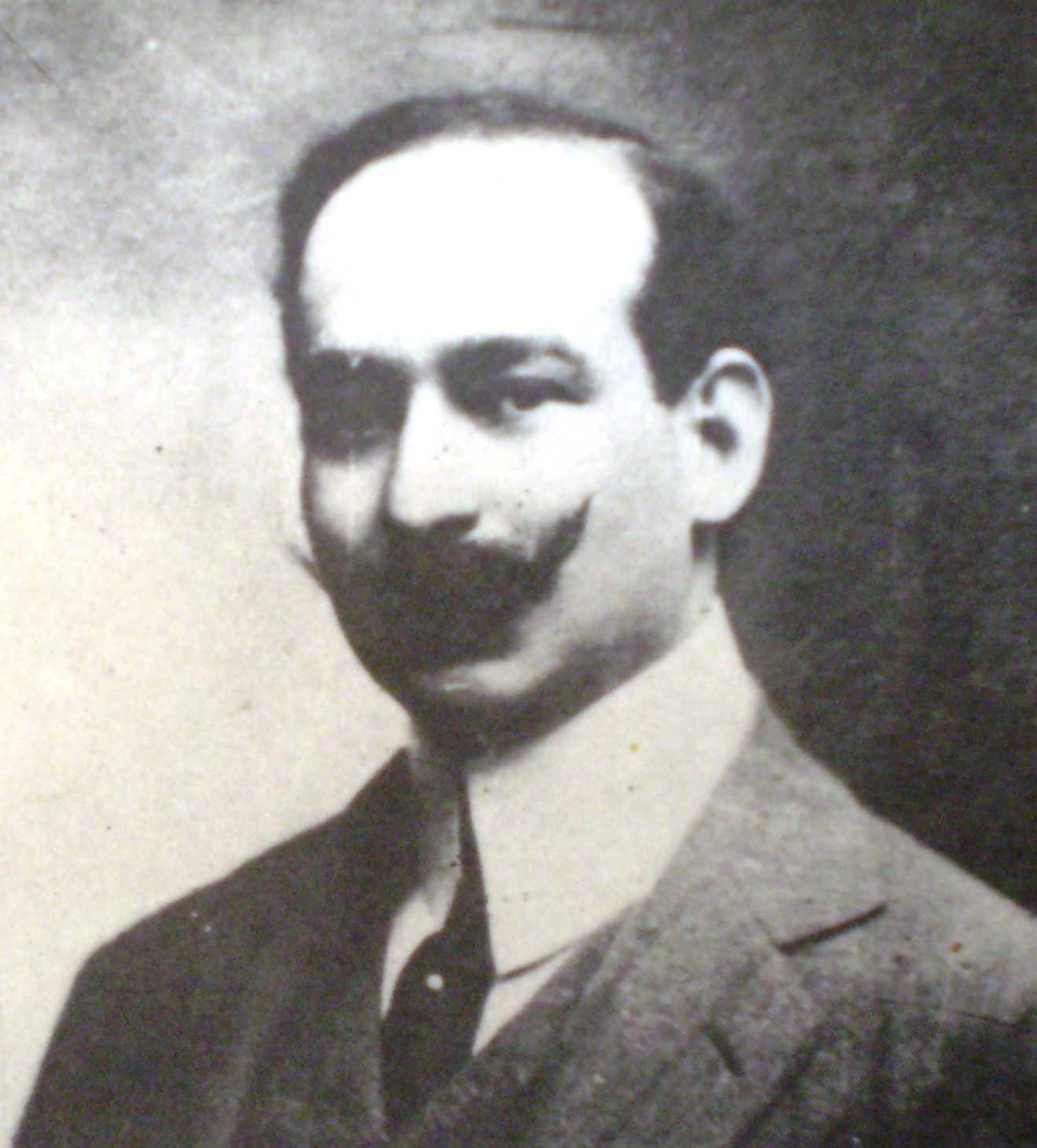 José Ingenieros (Archivo General de la Nación)